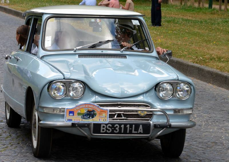 9ème "traversée de Paris estivale" en véhicules de collection, organisée par l'association Vincennes en anciennes. Arrivée au Parc de l'observatoire de Meudon.